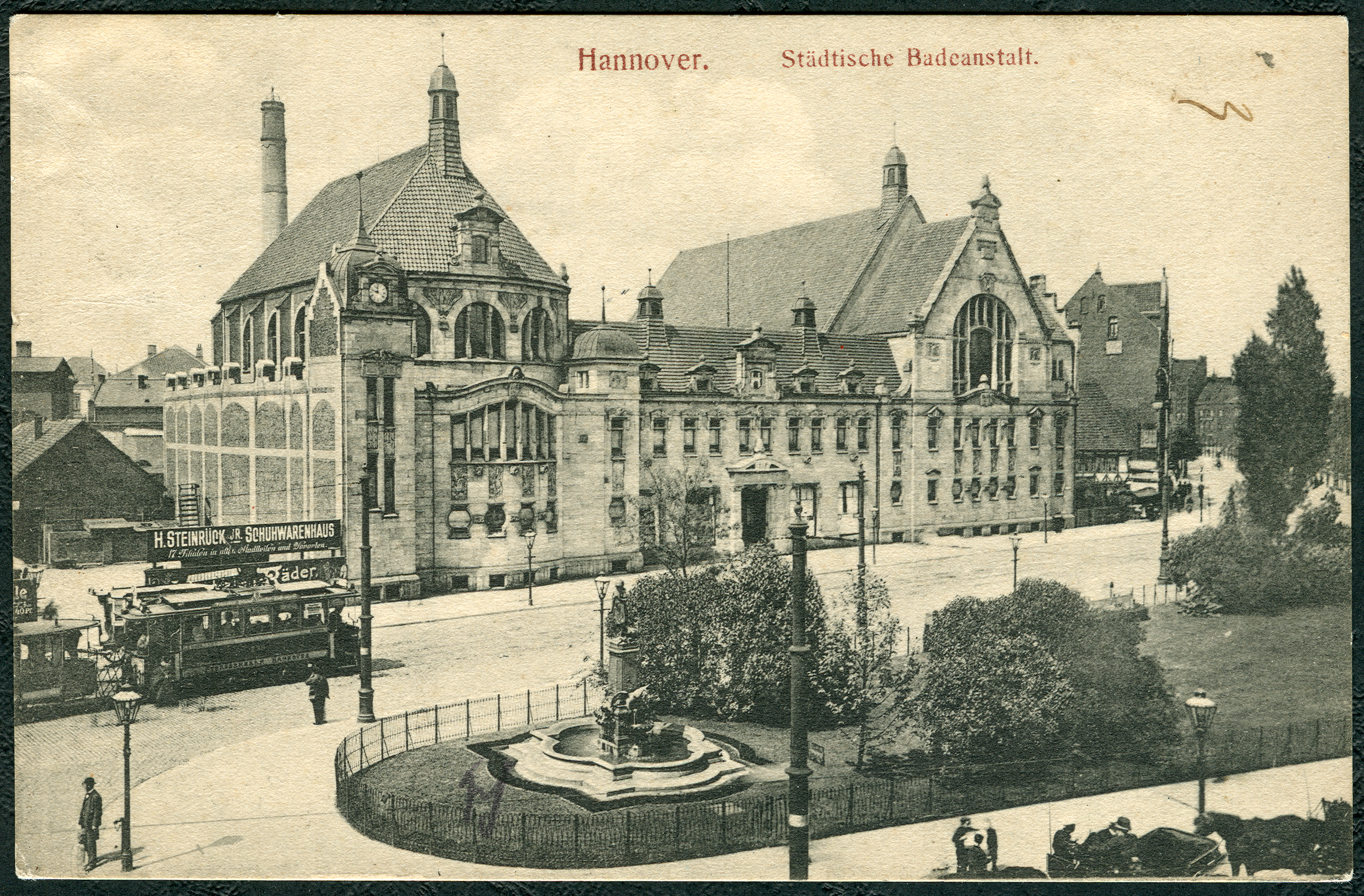 Goseriedebad